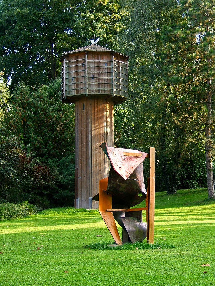 Hölzerner Turm und Skulptur "Brandung" von Klaus Hartmann in den Schlossanlagen Schorndorf, Deutschland